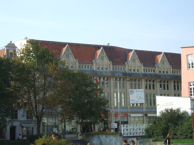 Stralsund,_Germany,_Wertheimkaufhaus_(2006-09-29).JPG